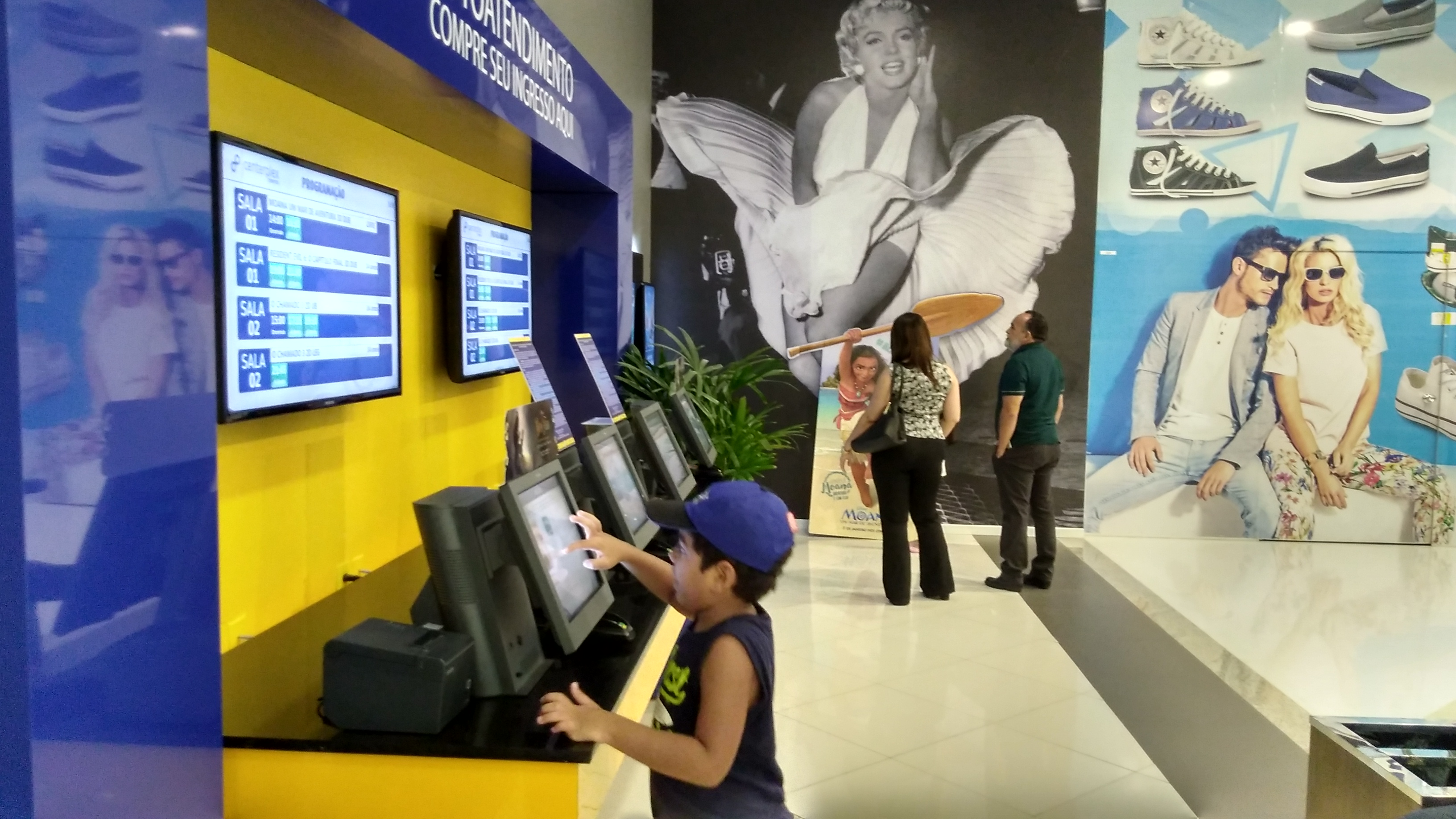 Auto atendimento Centerplex Gran Shopping Messejana de Fortaleza, CE